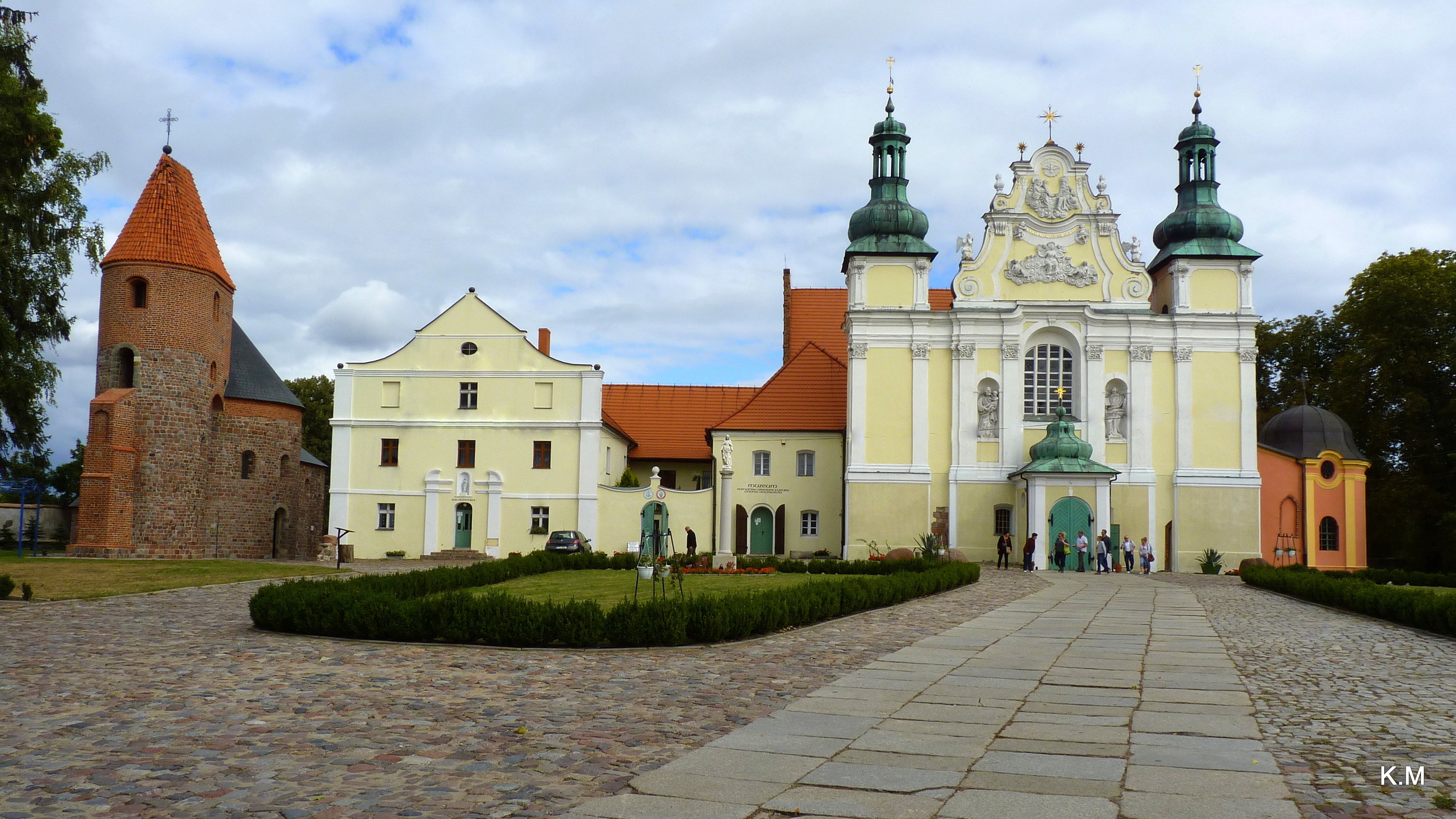 Widok - kościoła p.w. Św. Trójcy w Strzelnie